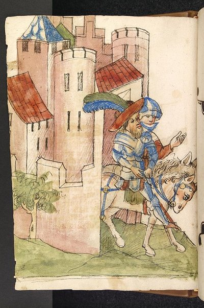 Bildtitel: Gahmuret verläßt seine Heimat mit einem Begleiter Wolfram von Eschenbach, Parzival (Handschrift), Hagenau, Werkstatt Diebold Lauber, um 1443-1446, Cod. Pal. germ. 339, I. Buch, Blatt 5v.